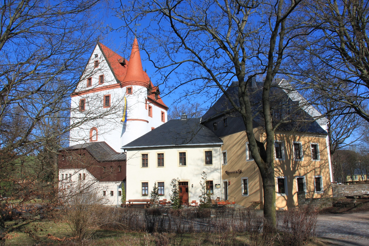 Gesamtansicht des Gebäudeensembles von Schloss Schlettau im Erzgebirge